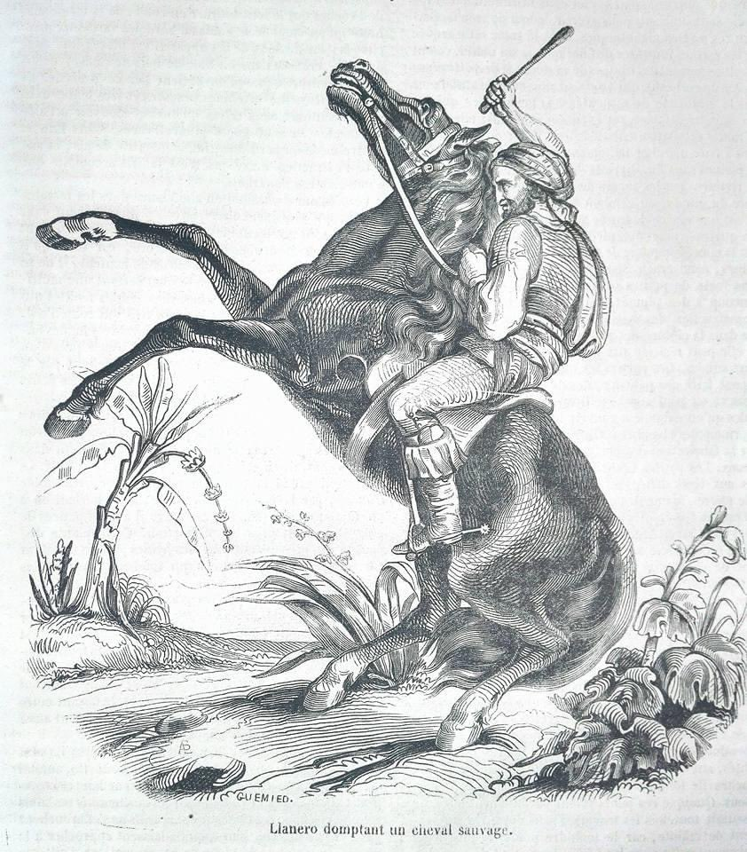 Illustration romantique d'un llanero au Venezuela selon le Musée Des Familles. 1838.